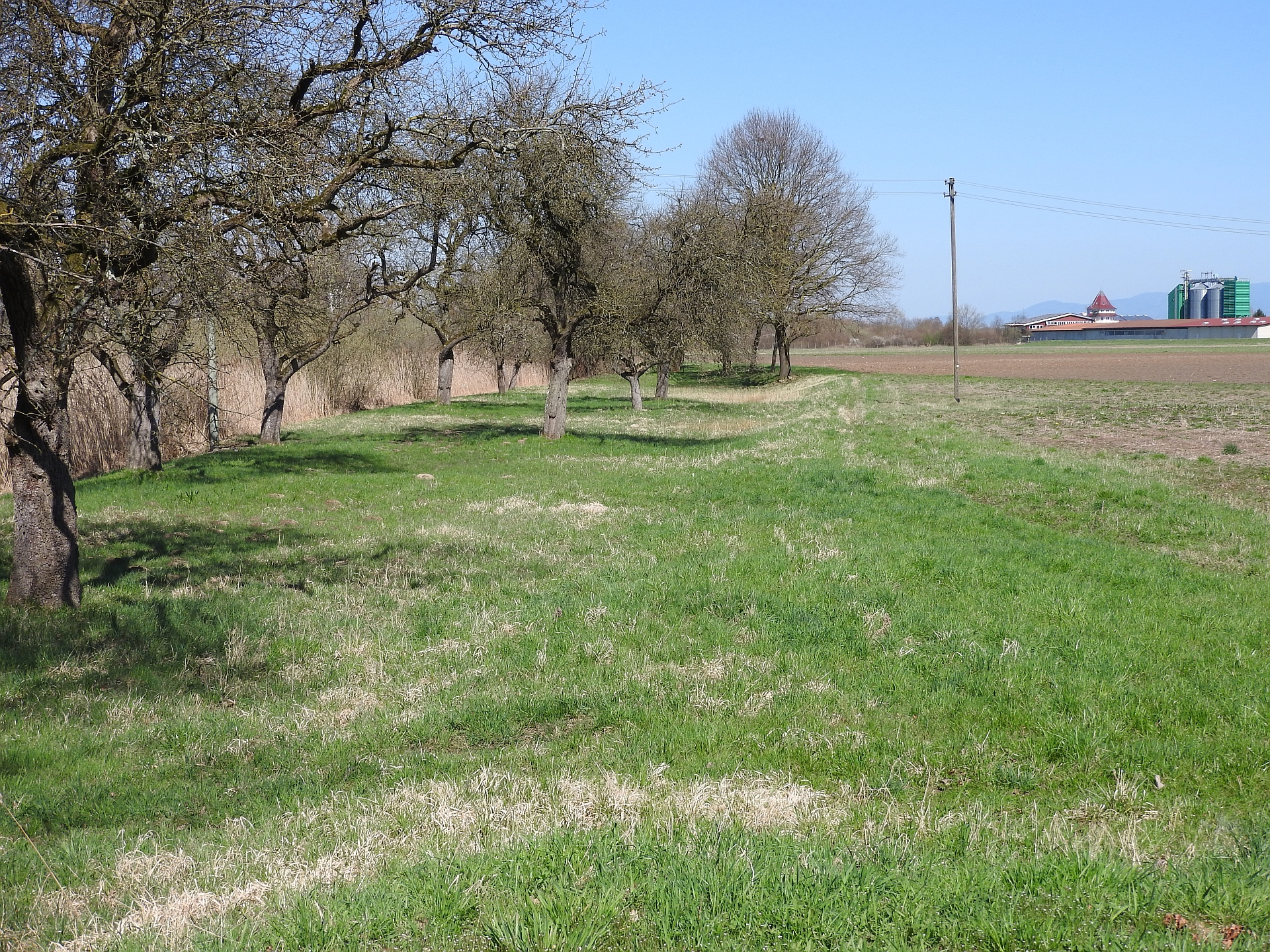 Naturschutzgebiet Sauscholle, 06.04.2018